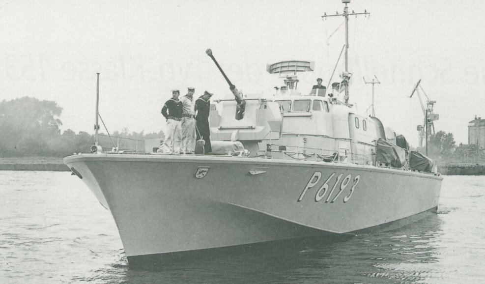 Schnellboot Pfeil